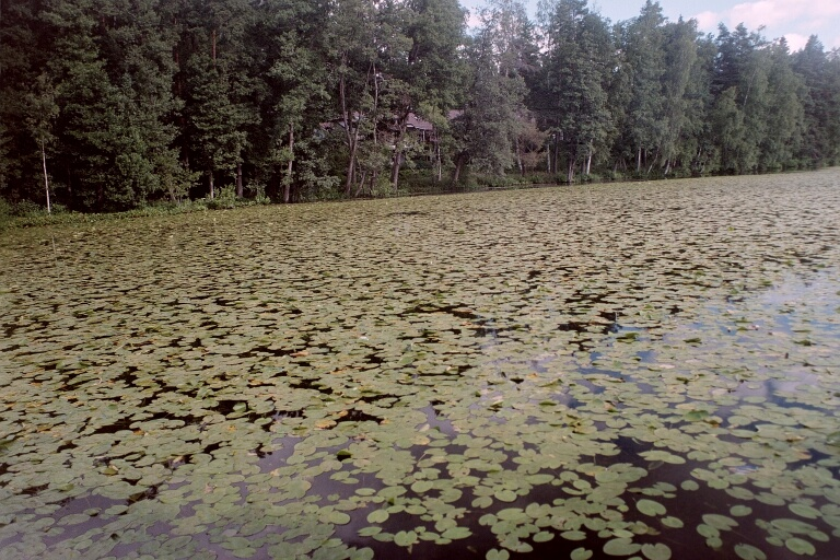 Rehevä järvi